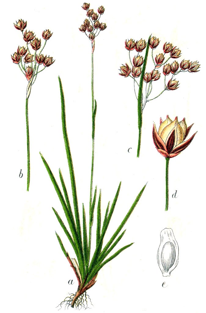 Luzula forsteri (Sm.) DC. Original Caption Forster-Hainsimse, Luzula forsteri